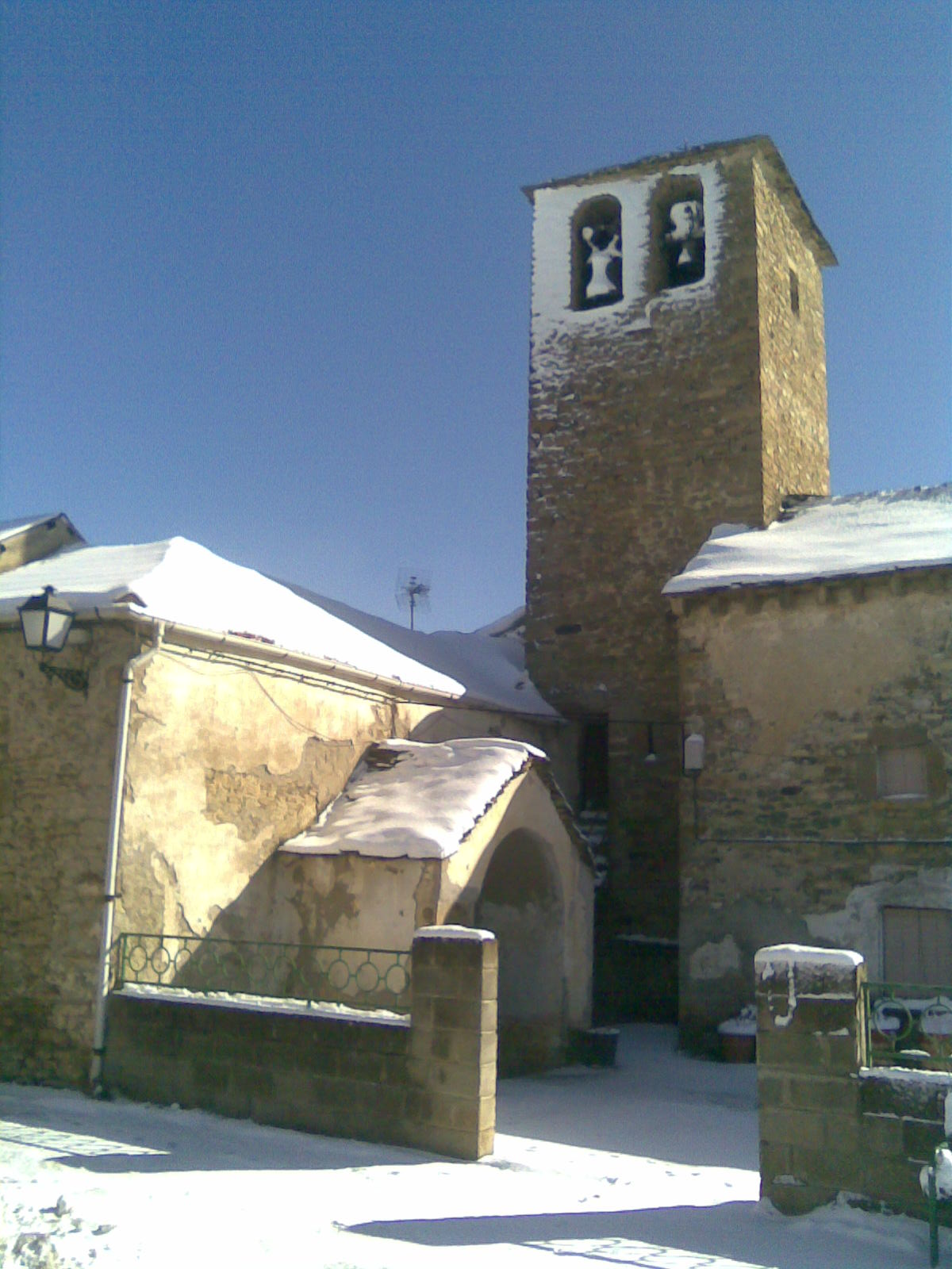 Iglesia de Aurín